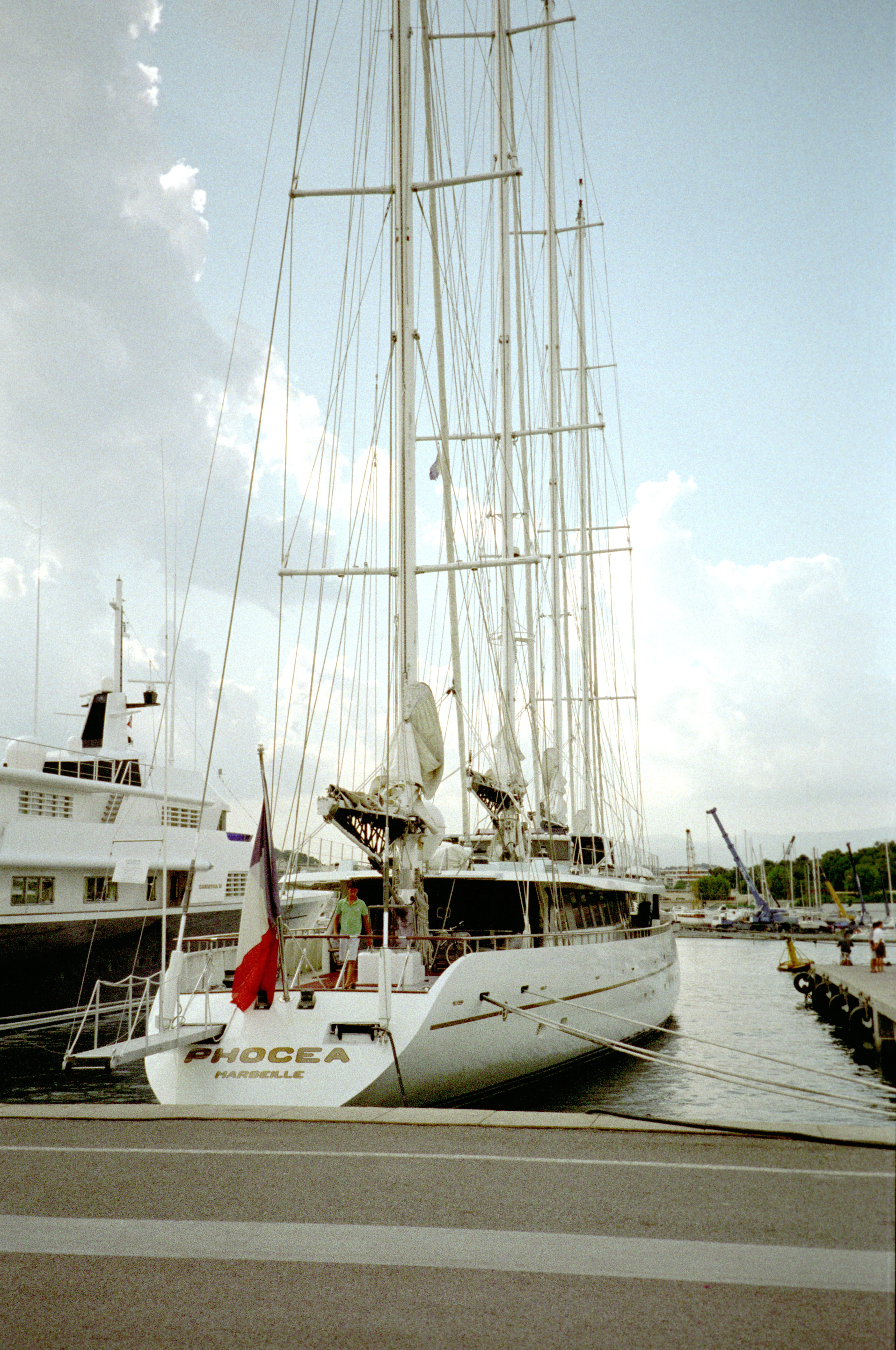 Le yacht de luxe le "Phocéa" dans le bassin de grande plaisance du port Vauban. Antibes, Alpes Maritimes, France.